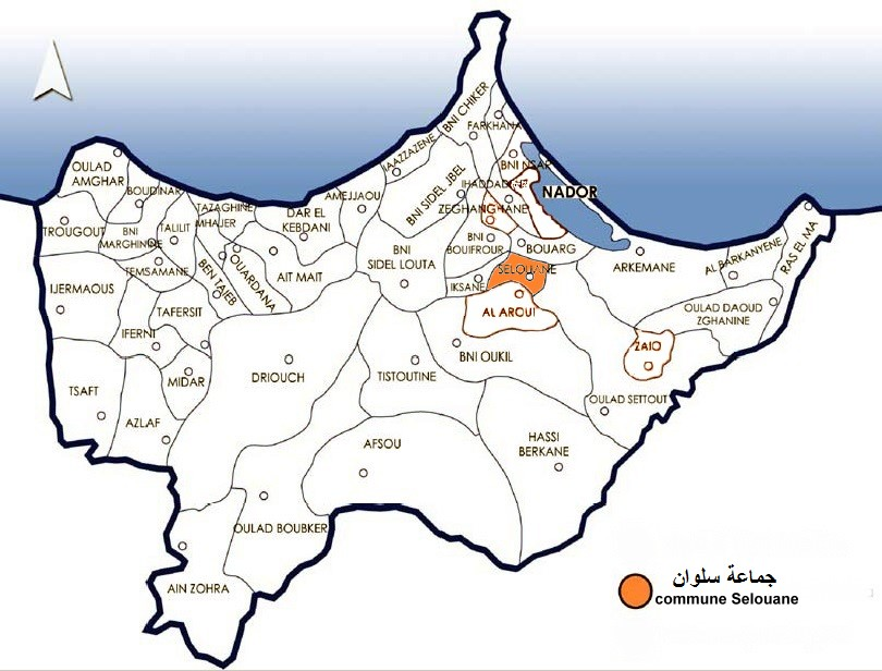 جماعة سلوان Commune Selouane